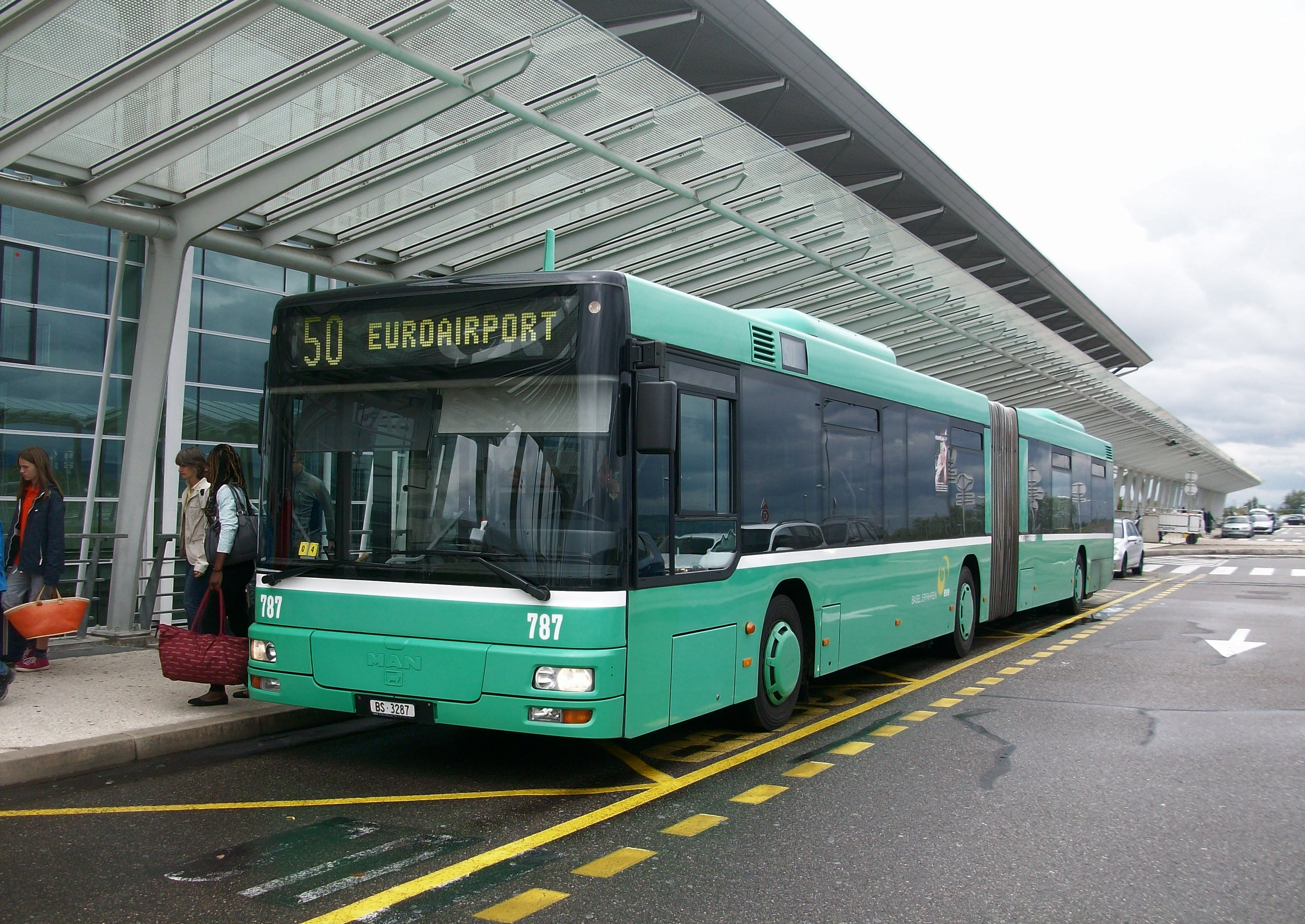 Un autobus MAN des BVB sur la ligne 50, côté Suisse de l'EuroAiport